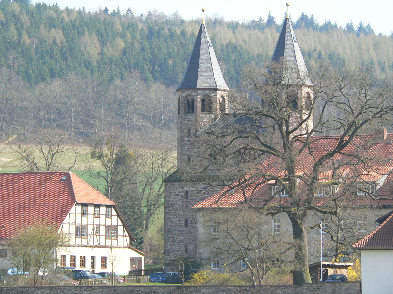 Doppelkirche des ehemaligen Benediktiner-Klosters Bursfelde an der Weser